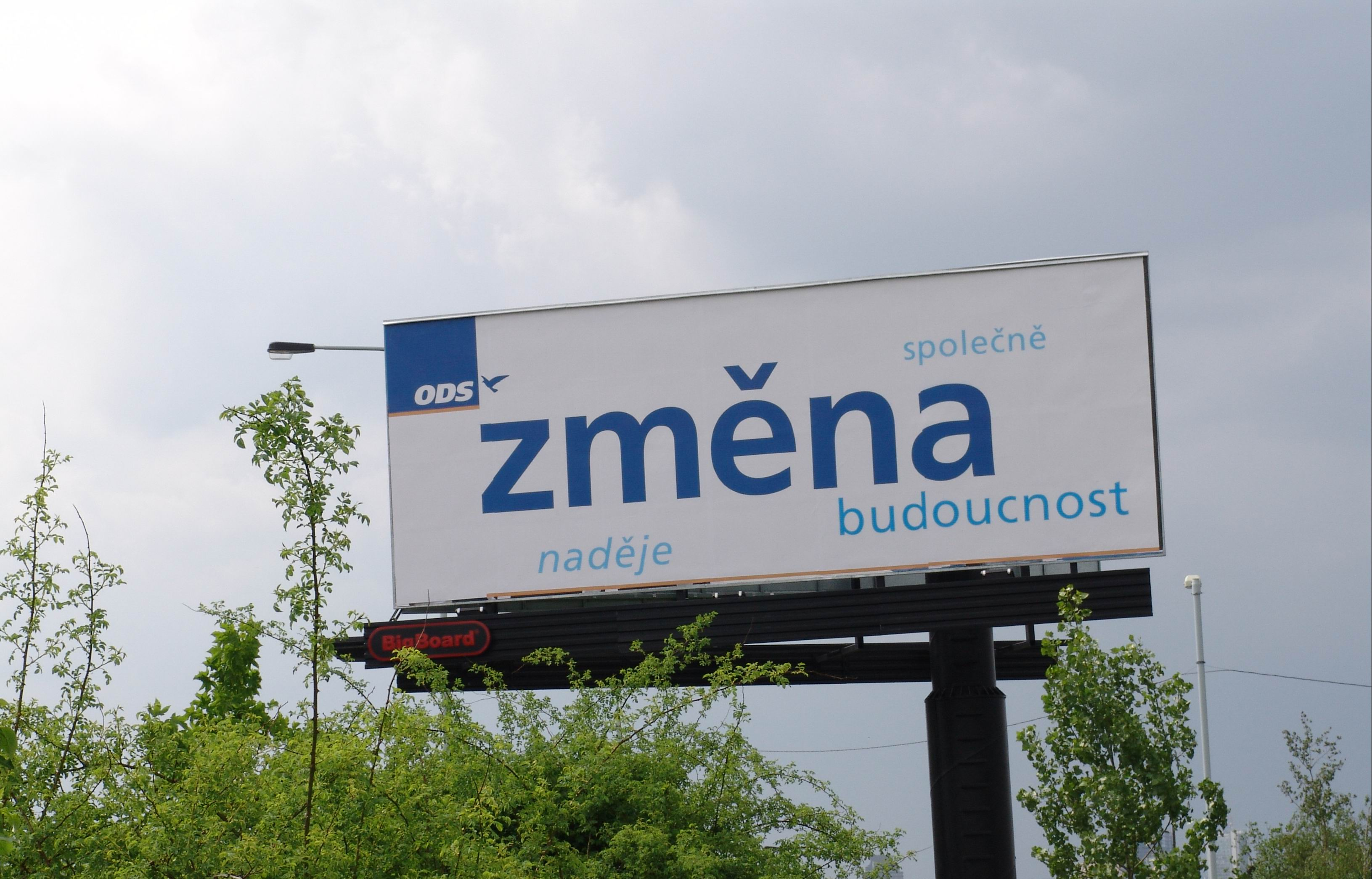 Předvolební billboard Občanské demokratické strany před červnovými volbami do poslanecké sněmovny v roce 2006